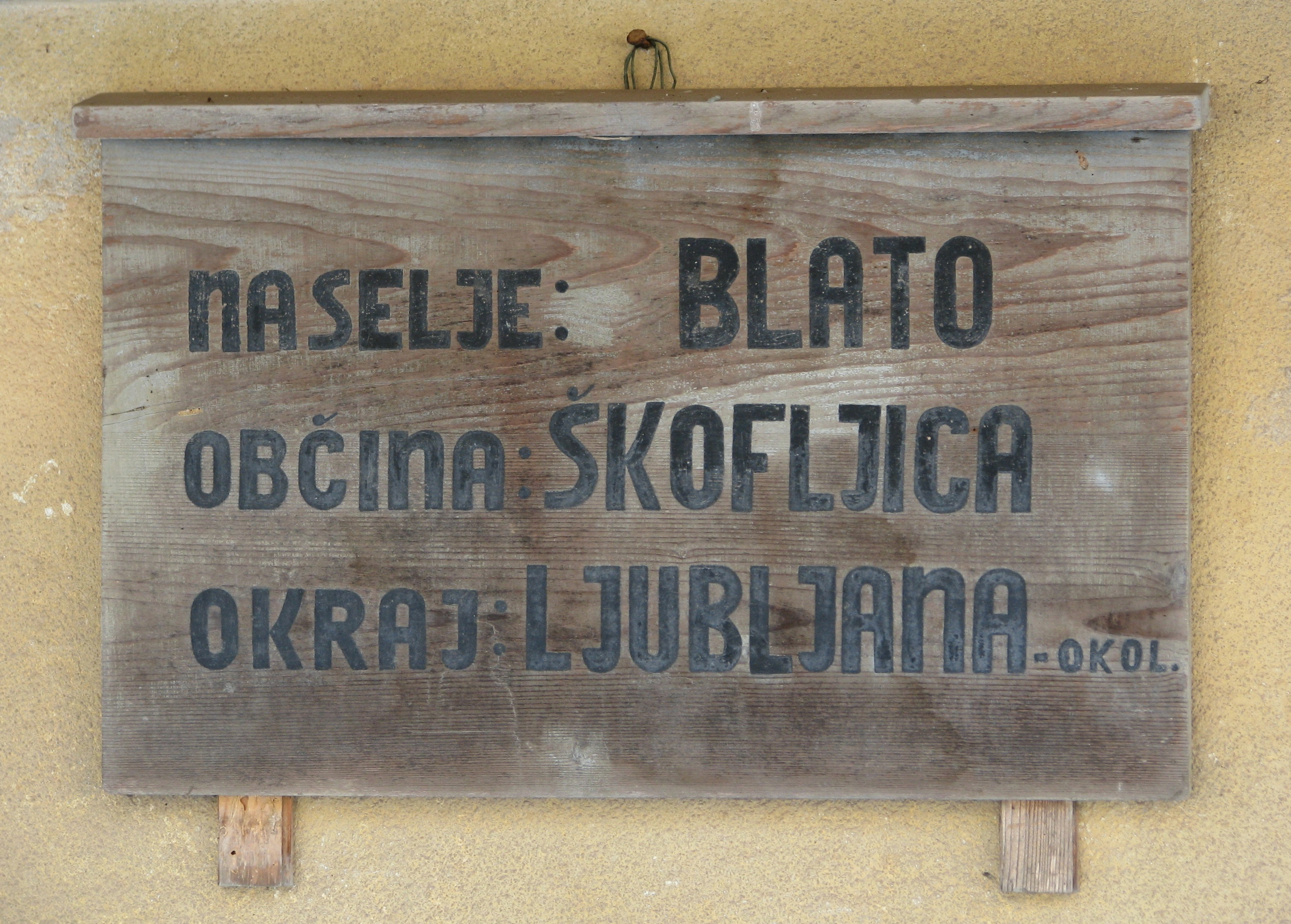 Tabla iz let okrog 1952 na Šuštarjevi domačiji, ki označuje naselje Gorenje Blato